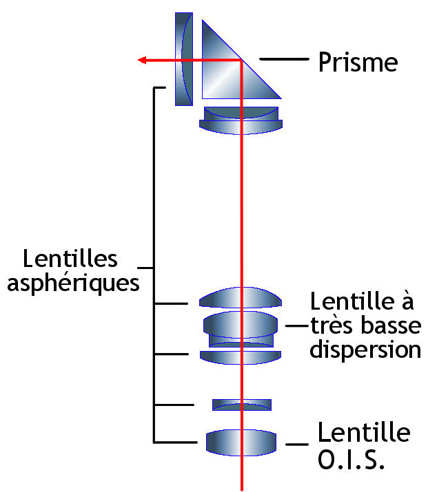 Système optique d'un appareil photo Lumix FT1